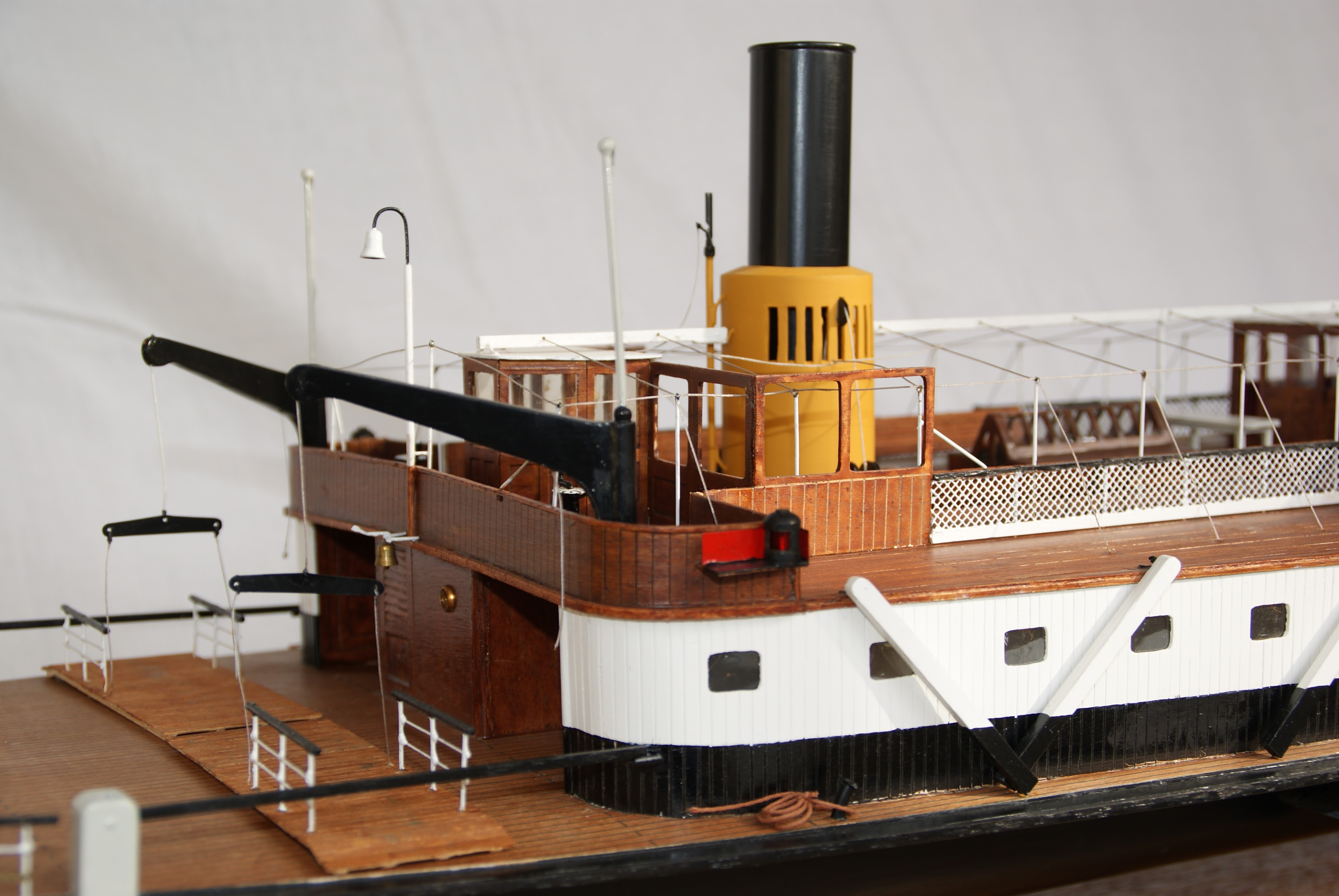 Schaalmodel van de 6 ( detail ), gemaakt door A.Alblas